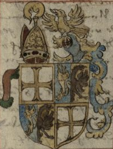 Wappen des Lübecker Bischofs Wilhelm Westphal (Bischof) aus der Rehbein-Chronik